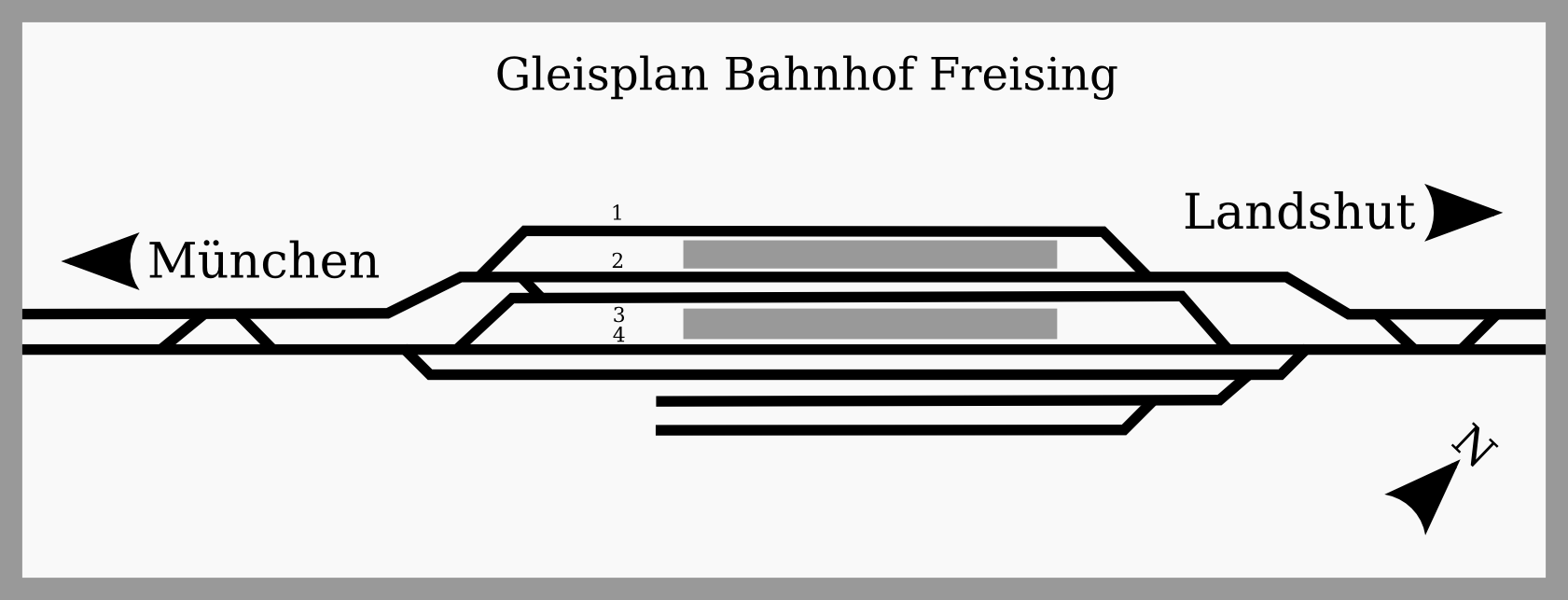 Gleisplan des Bahnhofs Freising